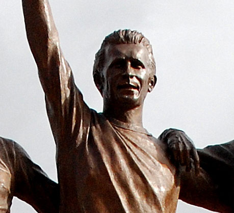 Standbeeld van George Best, Denis Law en Bobby Charlton bij het voetbalstadion van Manchester United in Manchester, Engeland